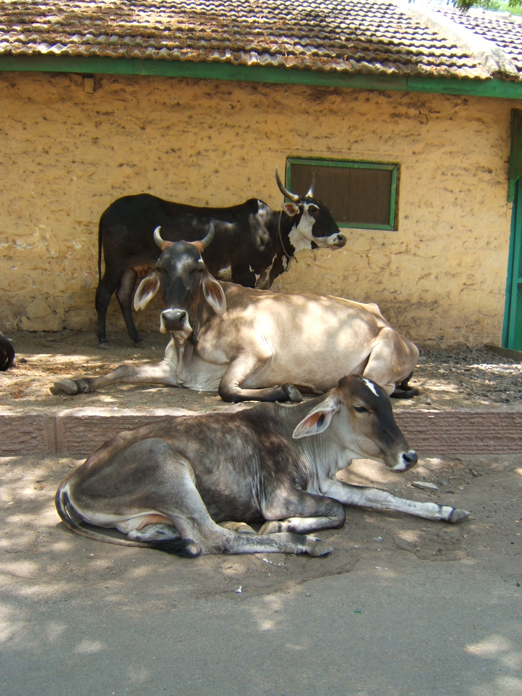 Cows in Karnataka, India